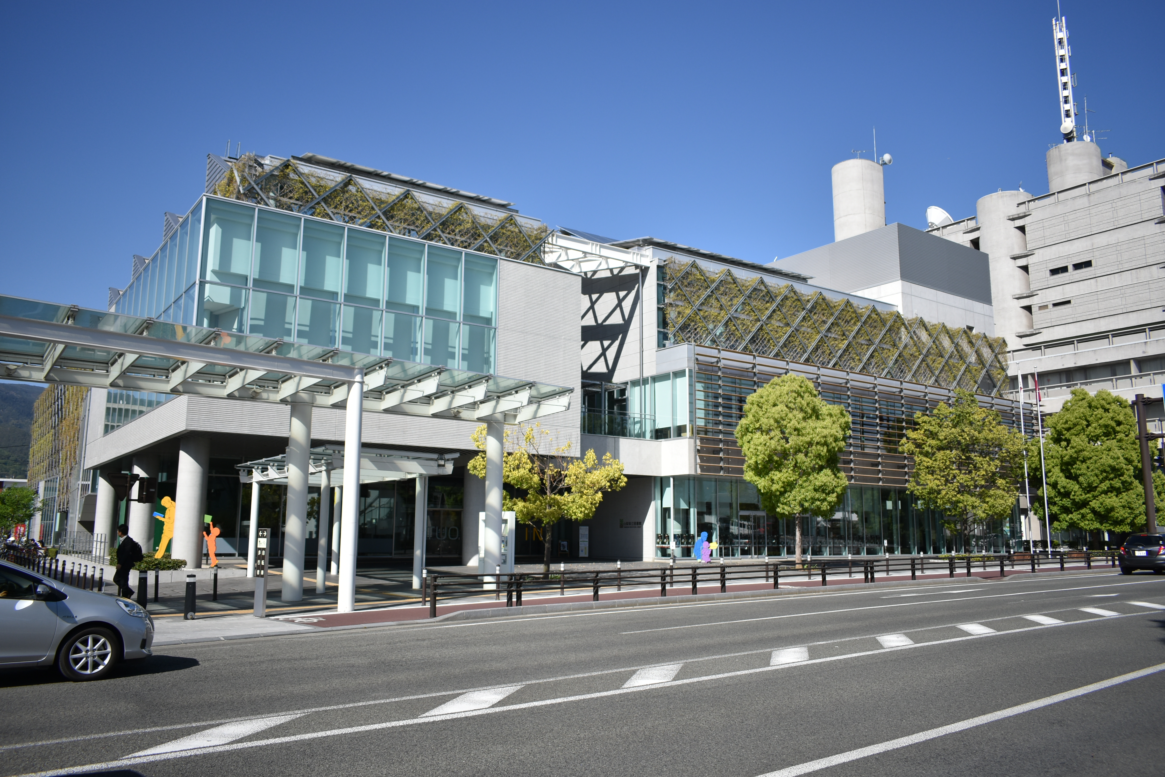 山梨県立図書館 Nikon D3400